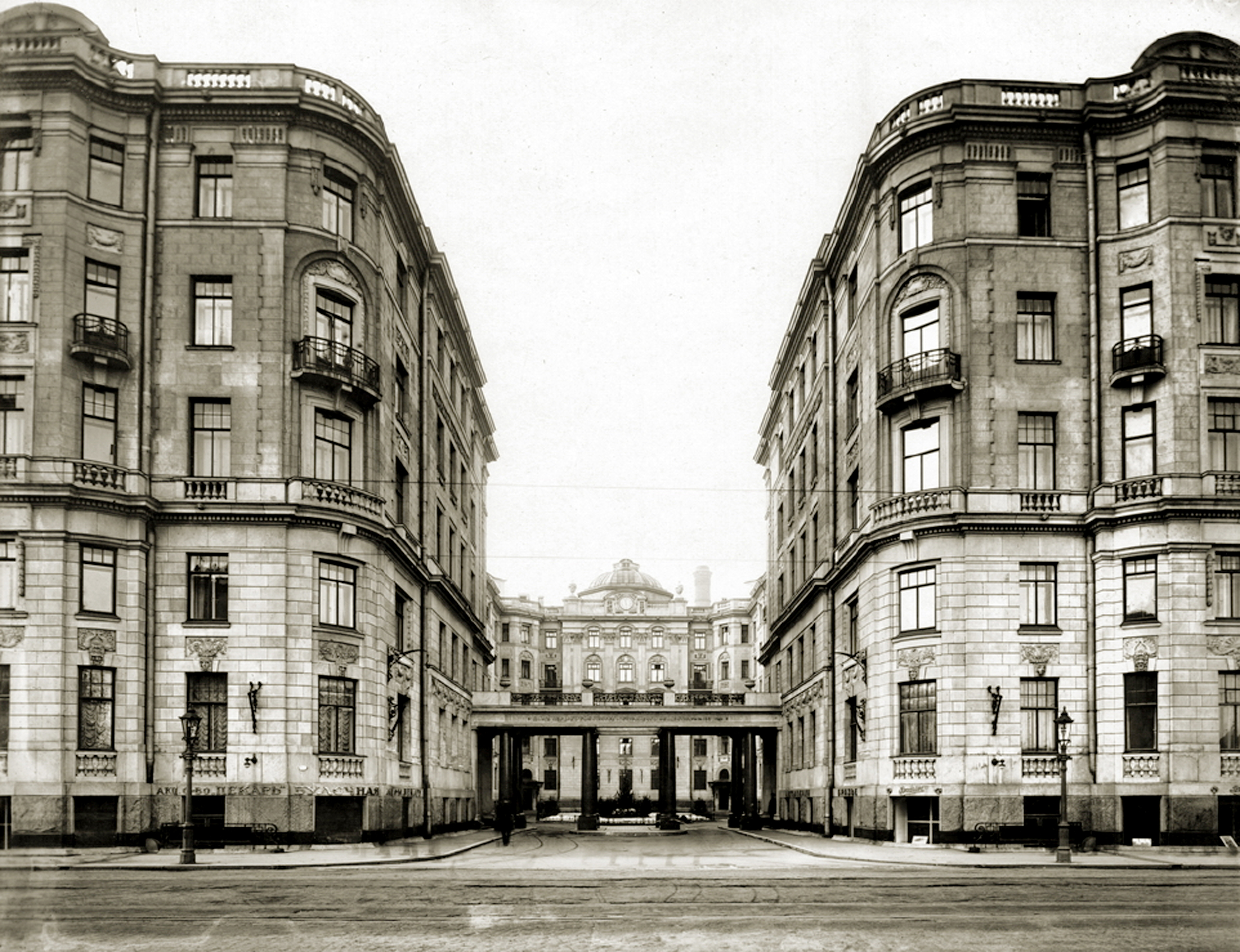 Санкт-Петербург. Фасад дома № 26-28 со стороны Каменноостровского проспекта. Около 1915 года.